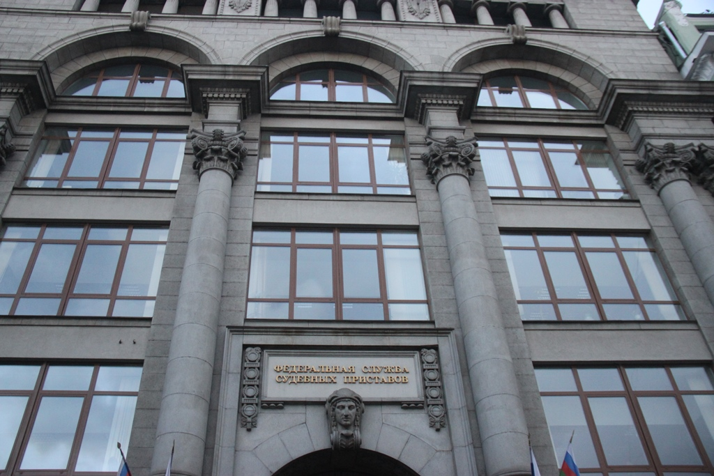 Кузнецкий мост, д. 16/5, строение 1 - здание центрального аппарата ФССП. Изначально - Коммерческий банк «И. В. Юнкер и К». Здание многократно перестраивалось: в 1900-е годы Адольфом Эрихсоном под модерн, в 1913-1915 Василием Ерамишанцевым и братьями Весниными под неоклассику.